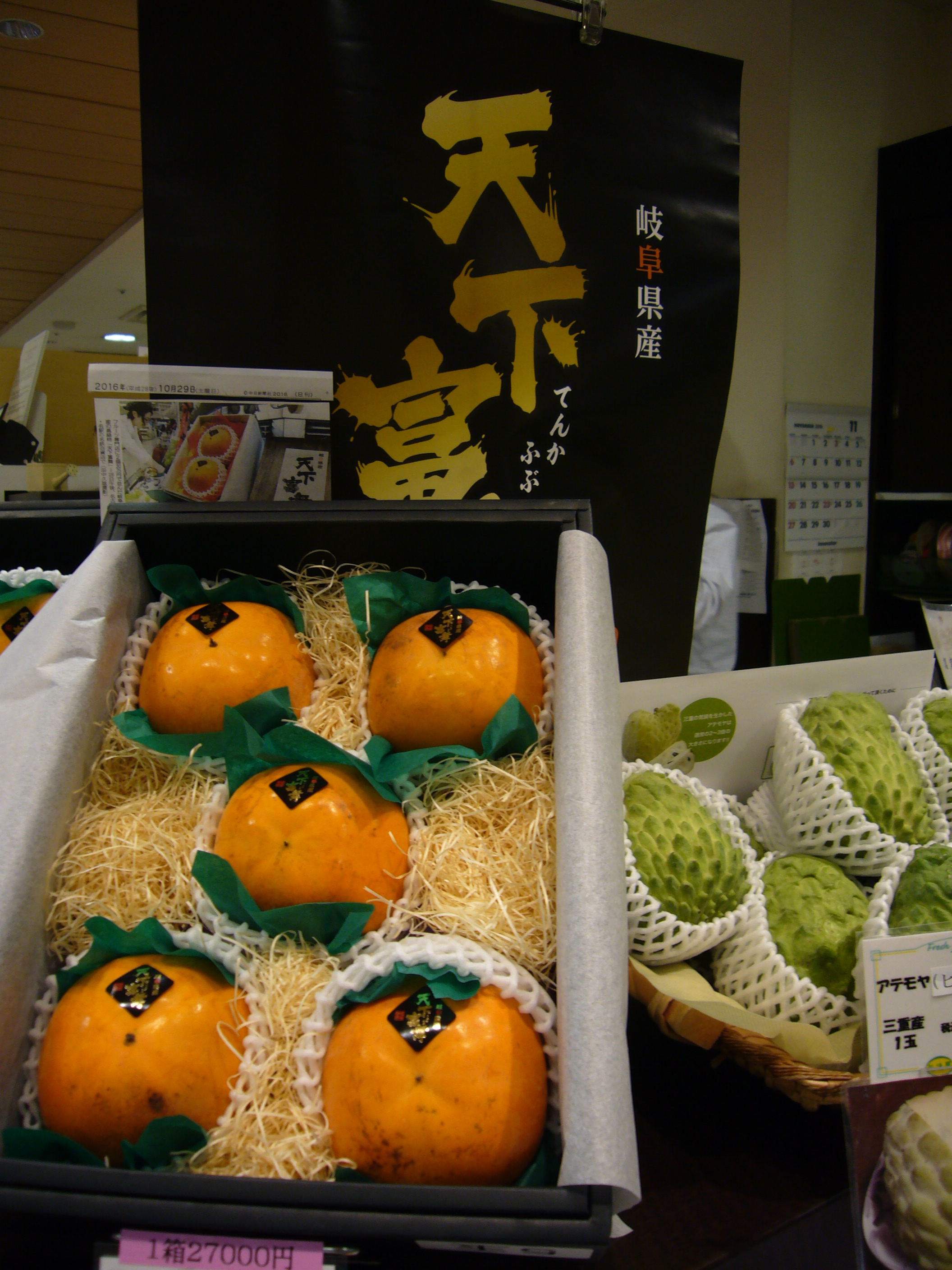 デパート地下で販売されている天下富舞